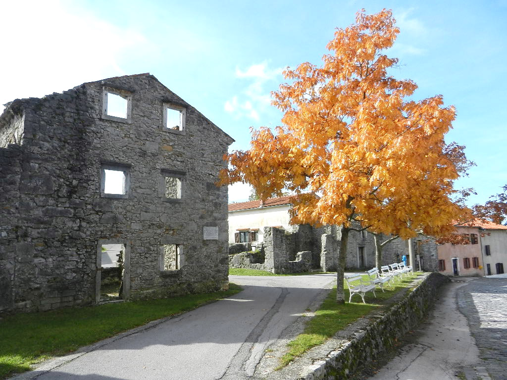 Lipu su spalili 30. travnja 1944. godine nacisti i pritom ubili 269 žitelja.